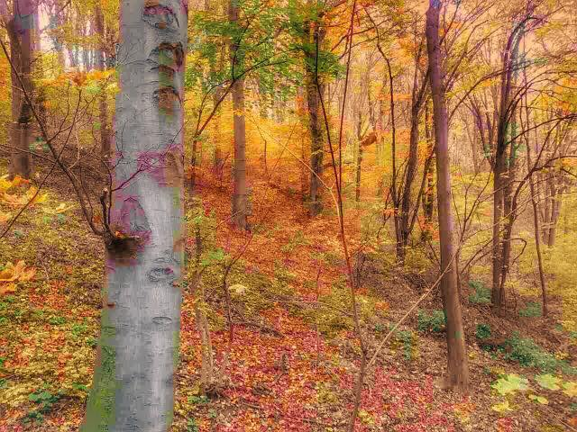 Српски (ћирилица): ПИО01 Ово је фотографија заштићеног природног добра у Србији под шифром: ПИО01This is a a photo of a natural area in Serbia with ID: ПИО01